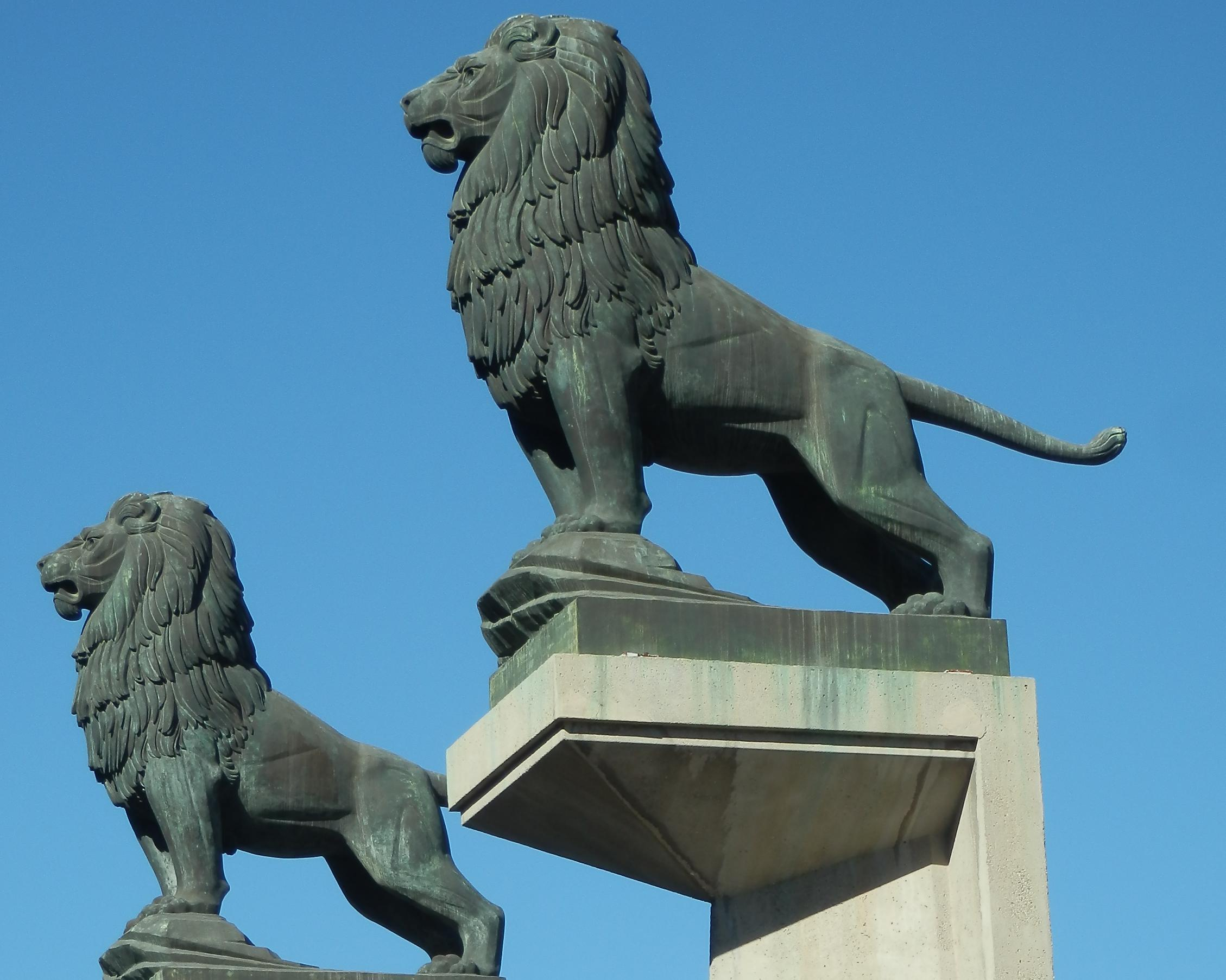 Leones en el Puente de Piedra de Zaragoza.